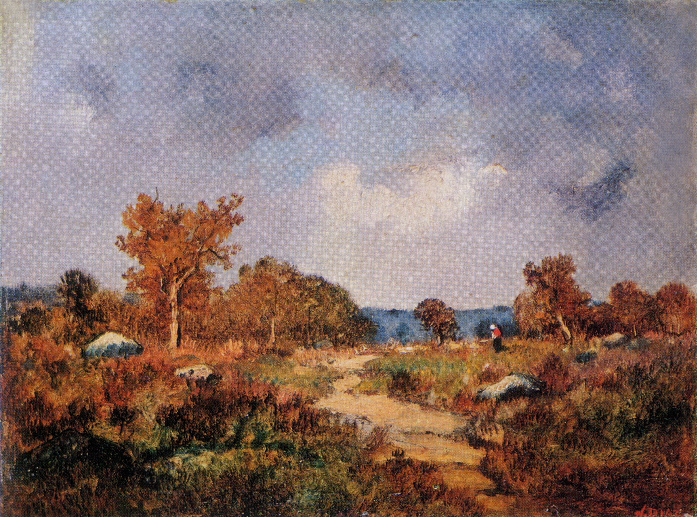 Autumn Landscape